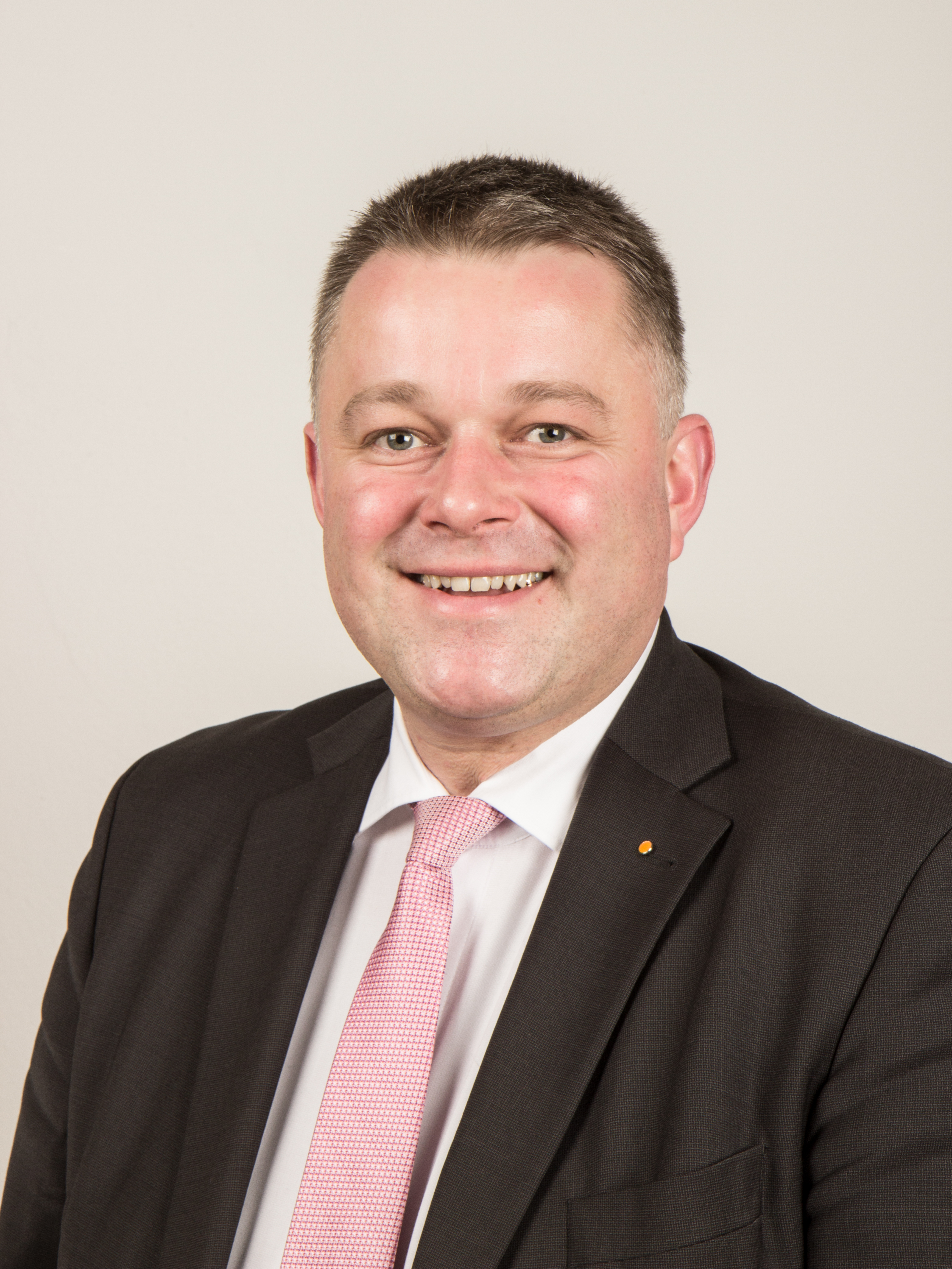 Der rheinland-pfälzische Landtagsabgeordnete Gordon Schnieder